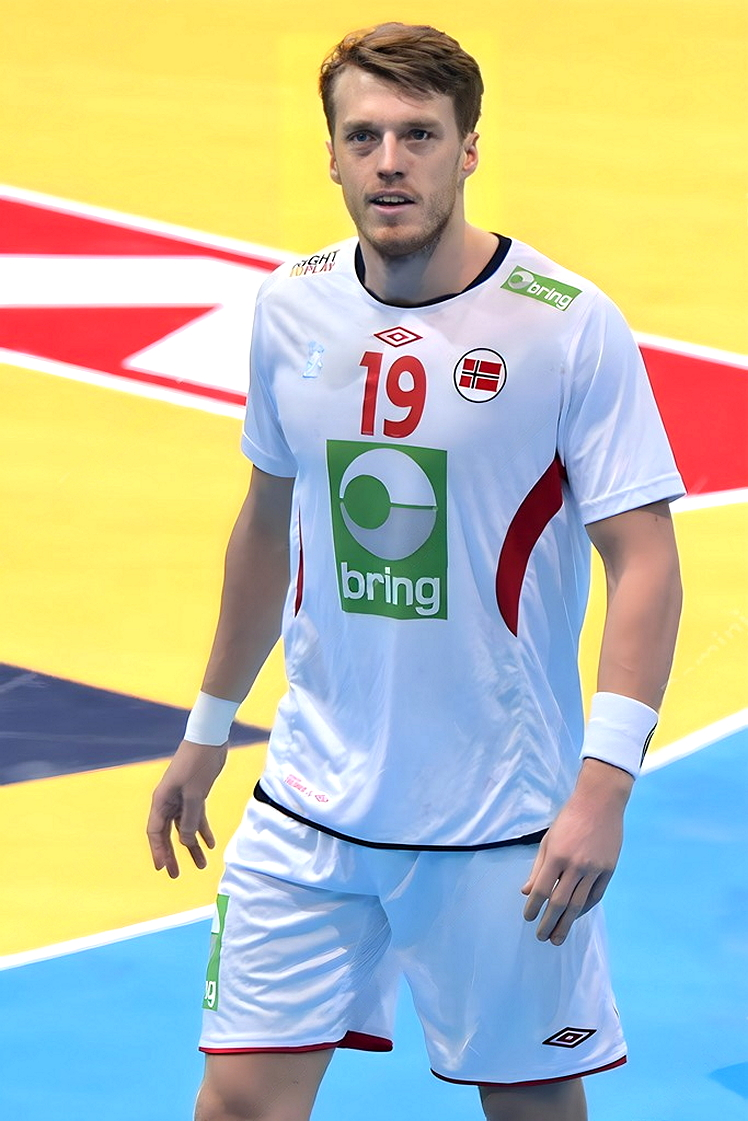 Le 10 janvier 2016 lors du match Norvège / Qatar durant la Golden League à l'AccordHotel Arena (Paris). Kristian Bjørnsen